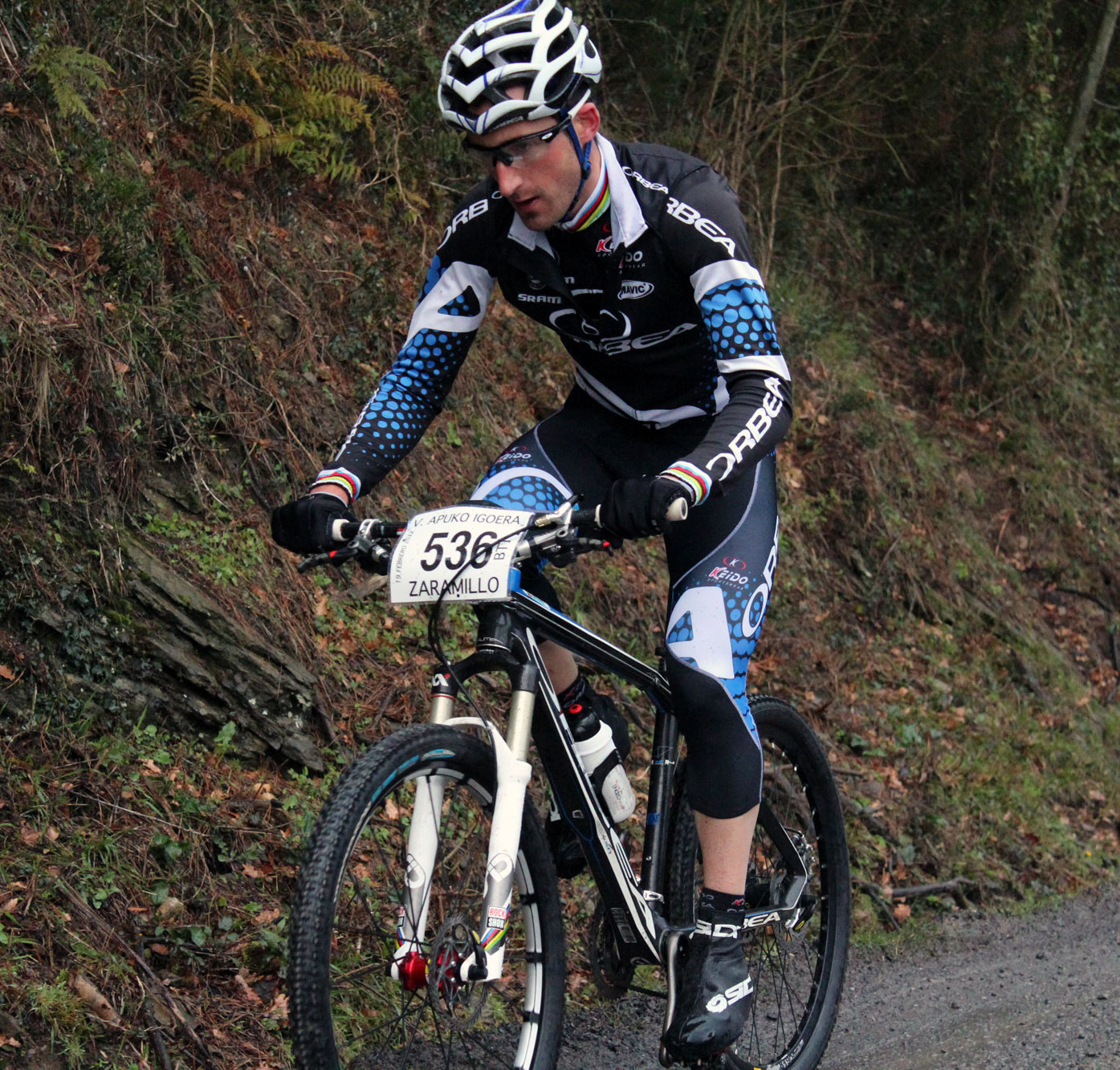 Iñaki Lejarreta en Apuko Igoera (Zaramillo, Güeñes) 19 de Febrero de 2012